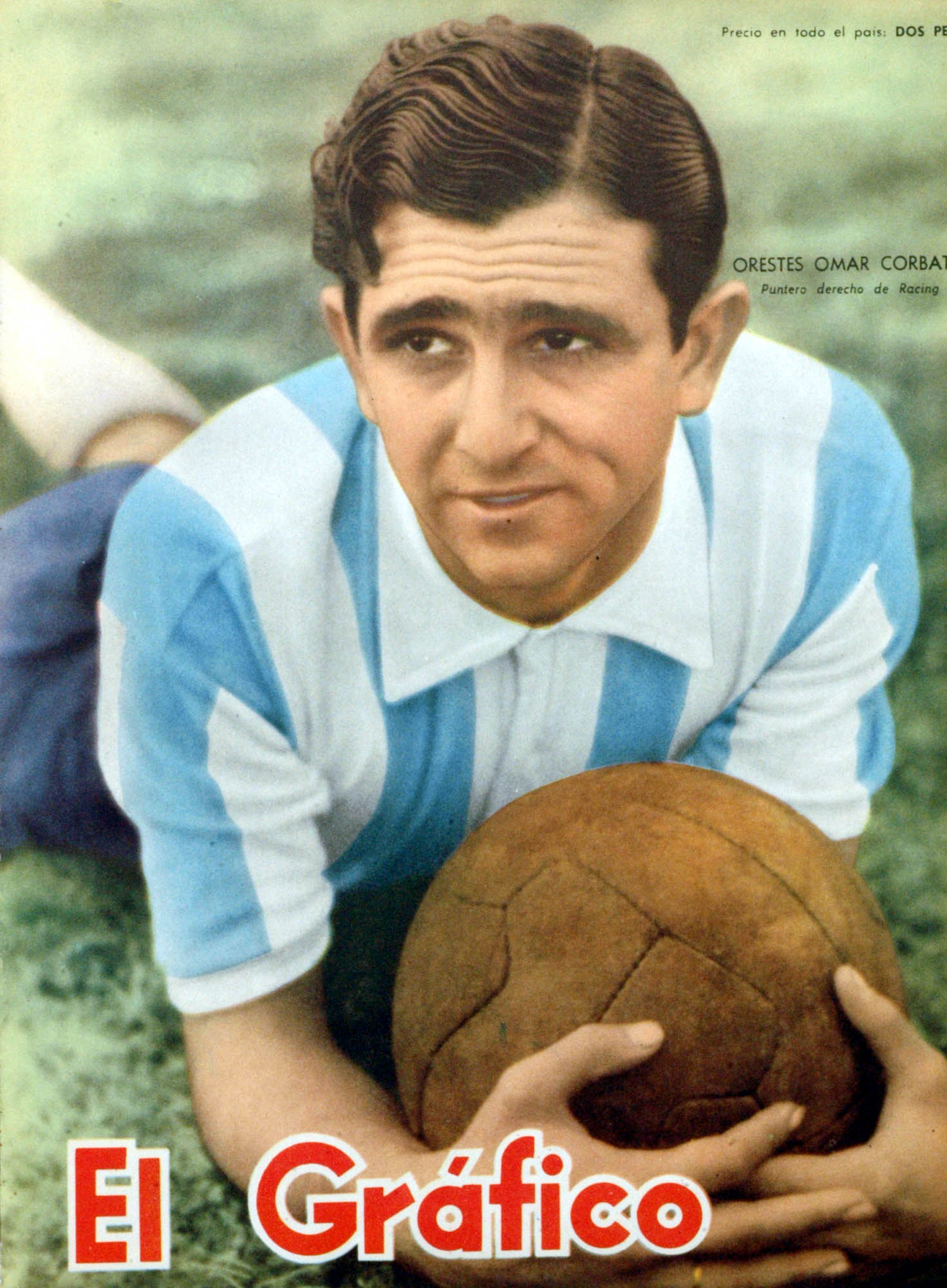 El Grafico del 31 de Agosto de 1956. Edicion 1932